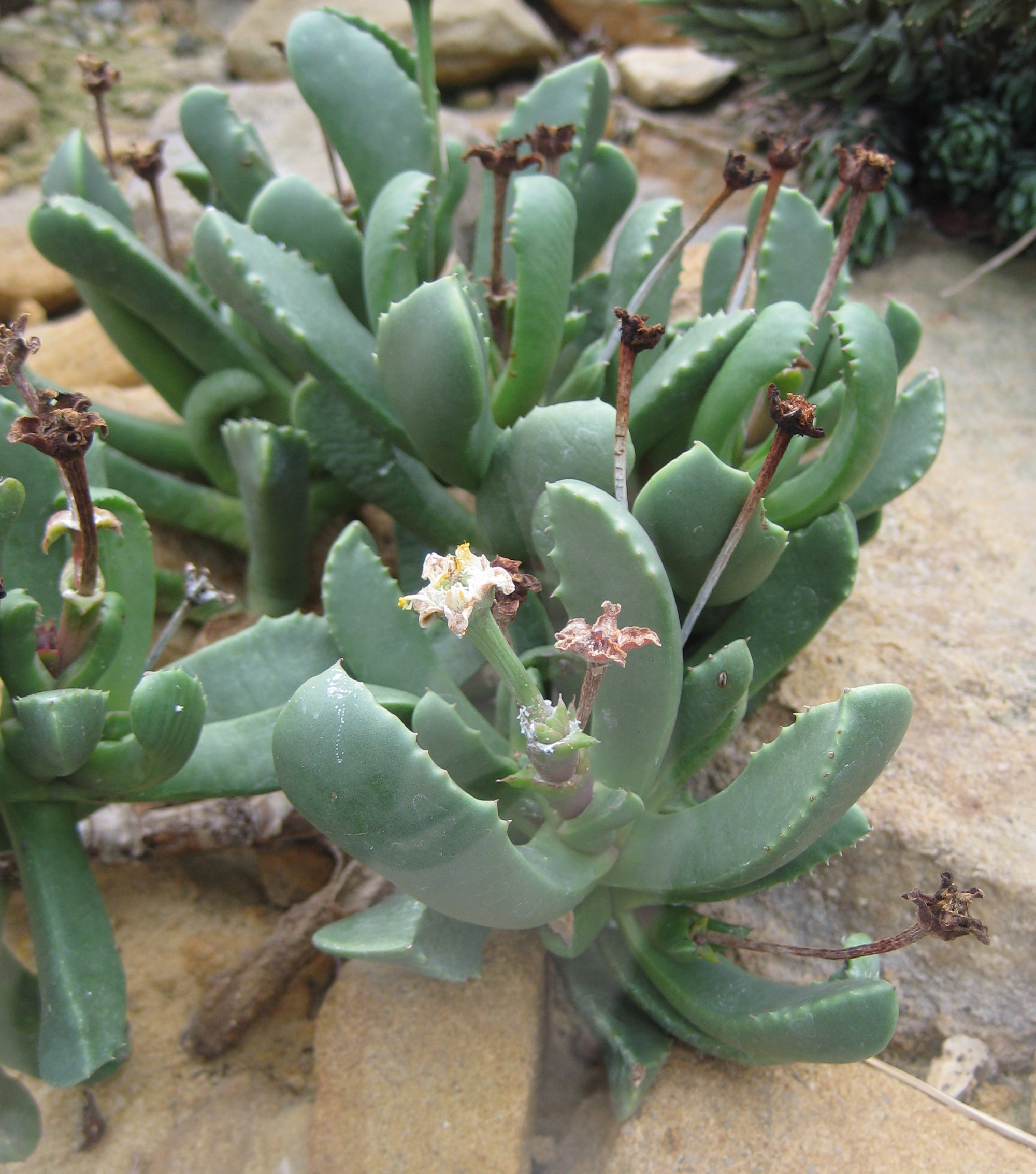 Carruanthus ringens im Botanischen Garten Dresden